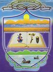 Escudo Repelon